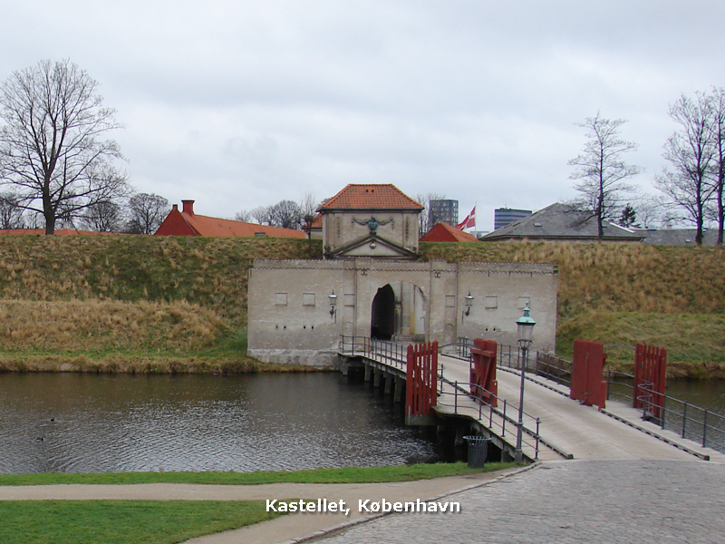 Foto af Kastellets hovedindgang ved den engelske kirke